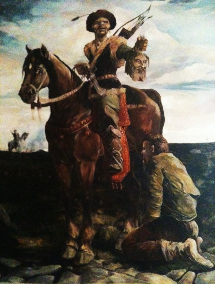 Wjazd Tatarów do Wiednia 1683 r.”- rok 1982, 180x160, olej na płótnie, fotografia Marek Kubski